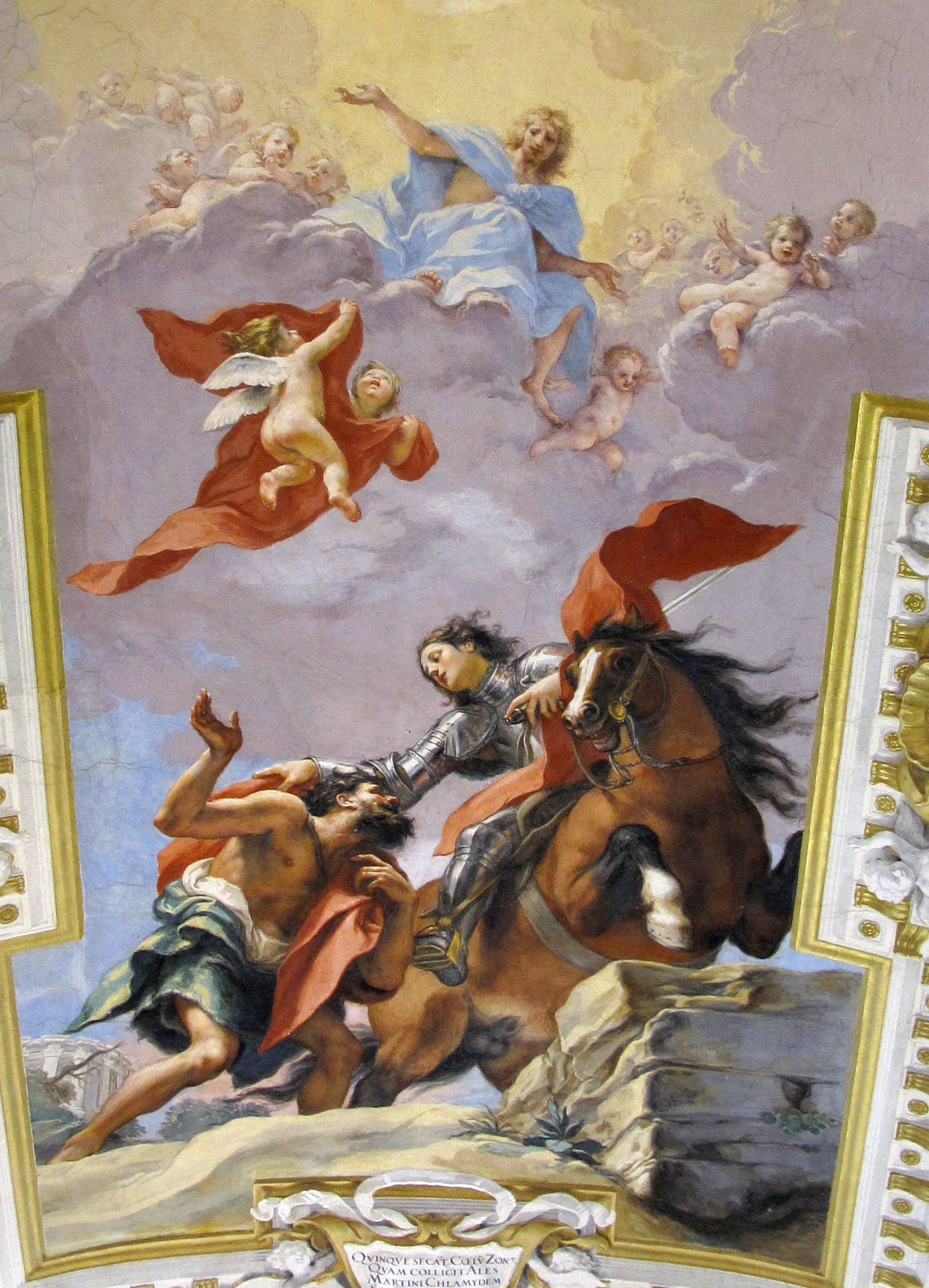 Firenze